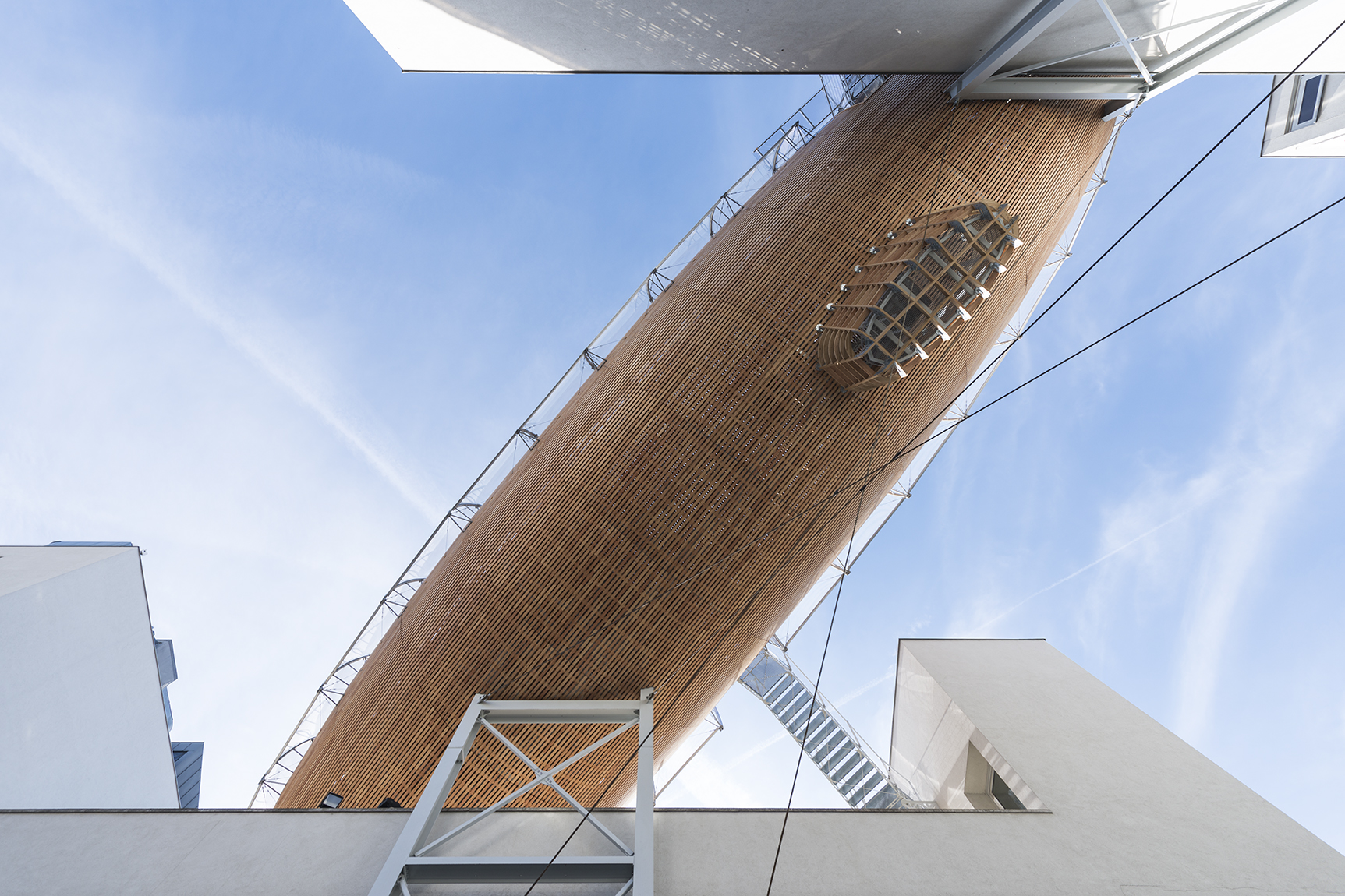 Vzducholoď Gulliver, DOX Praha, 2016, foto Jan Slavík